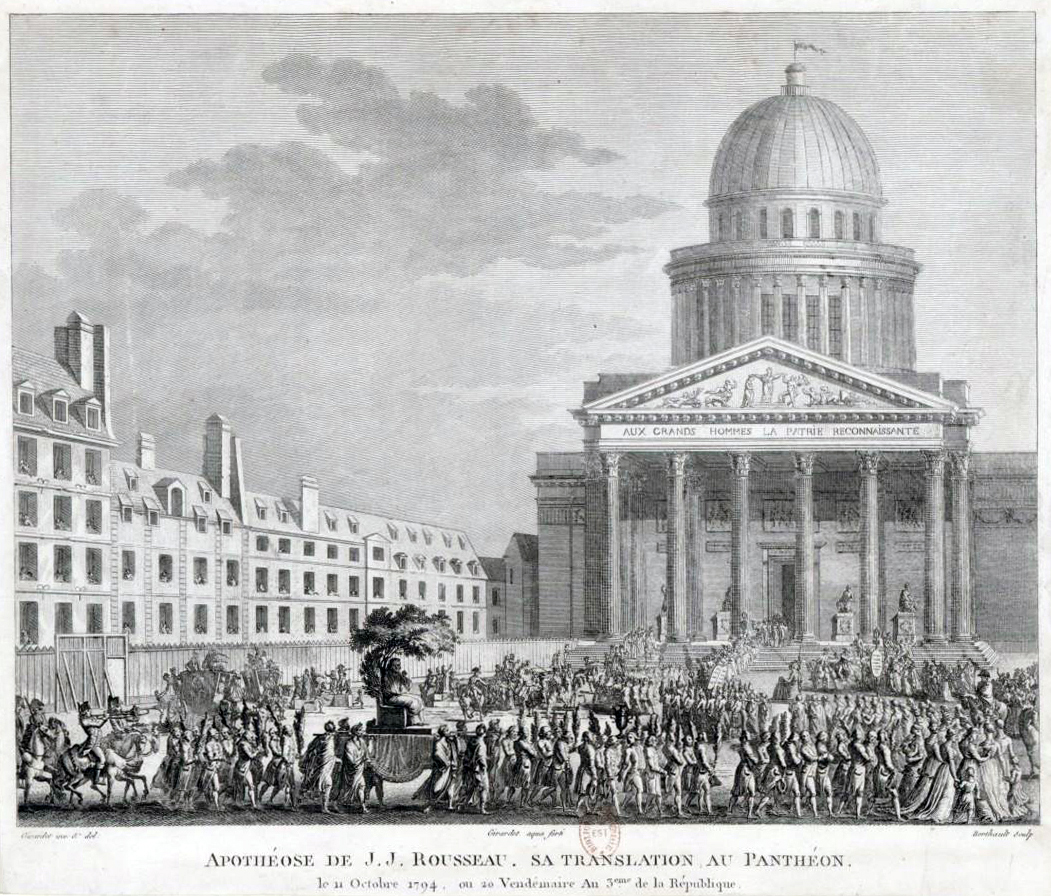 Gravure publiée dans Tableaux historiques de la Révolution française, 1791 – 1817. BnF Estampes Qb1 11.